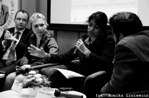 Konferencja: "Etyka i odpowiedzialność w działaniach wielkich mocarstw" Warszawa, 16 maja 2011, BUW n/z: Adam Bodnar, Olga Bobrova, Amrit Singh, Konstanty Gebert photo: Monika Lisiewicz